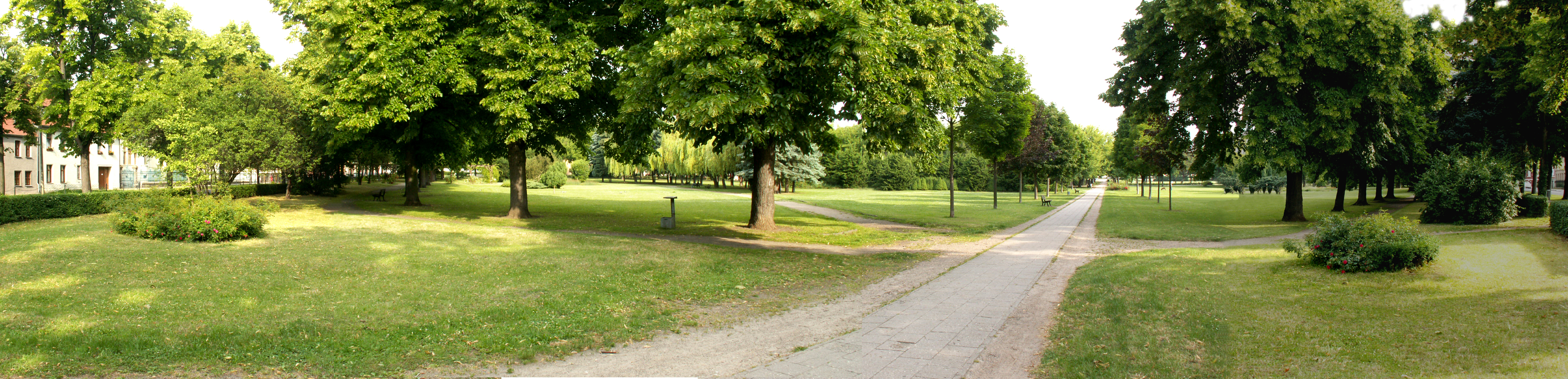 Panorama der Herrenbreite in Aschersleben vom Südosten aus